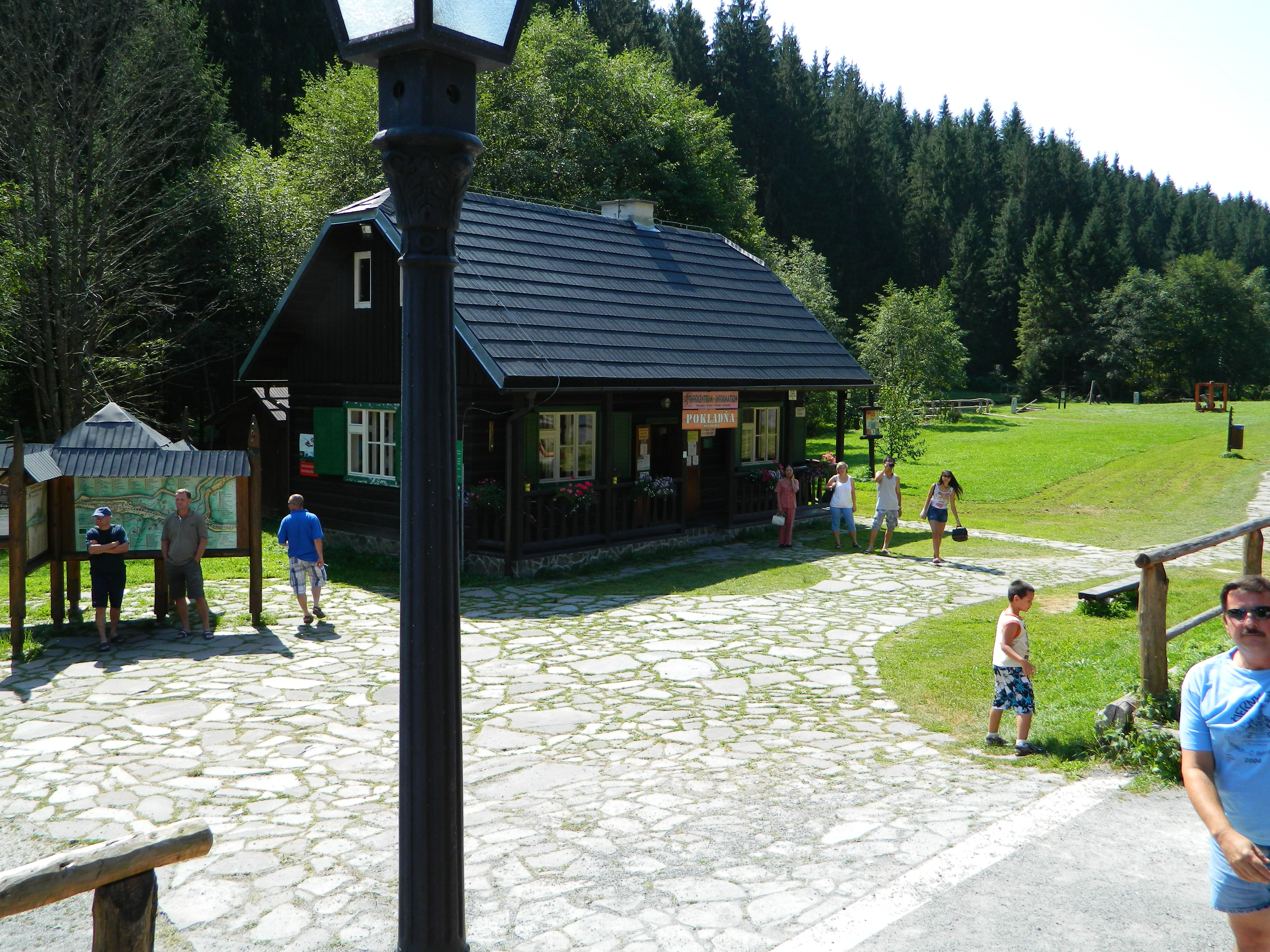 Infocentrum skanzenu